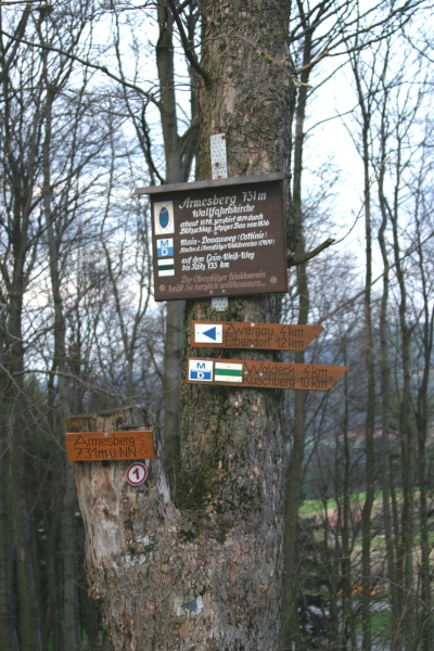 Wegweiser auf dem Armesberg in der Oberpfalz. - Signs at the Armesberg (Mount Armes) in the Upper Palatinate. - Des Poteaux en l'Armesberg (Mont Armes) à l'Haut-Palatinat.